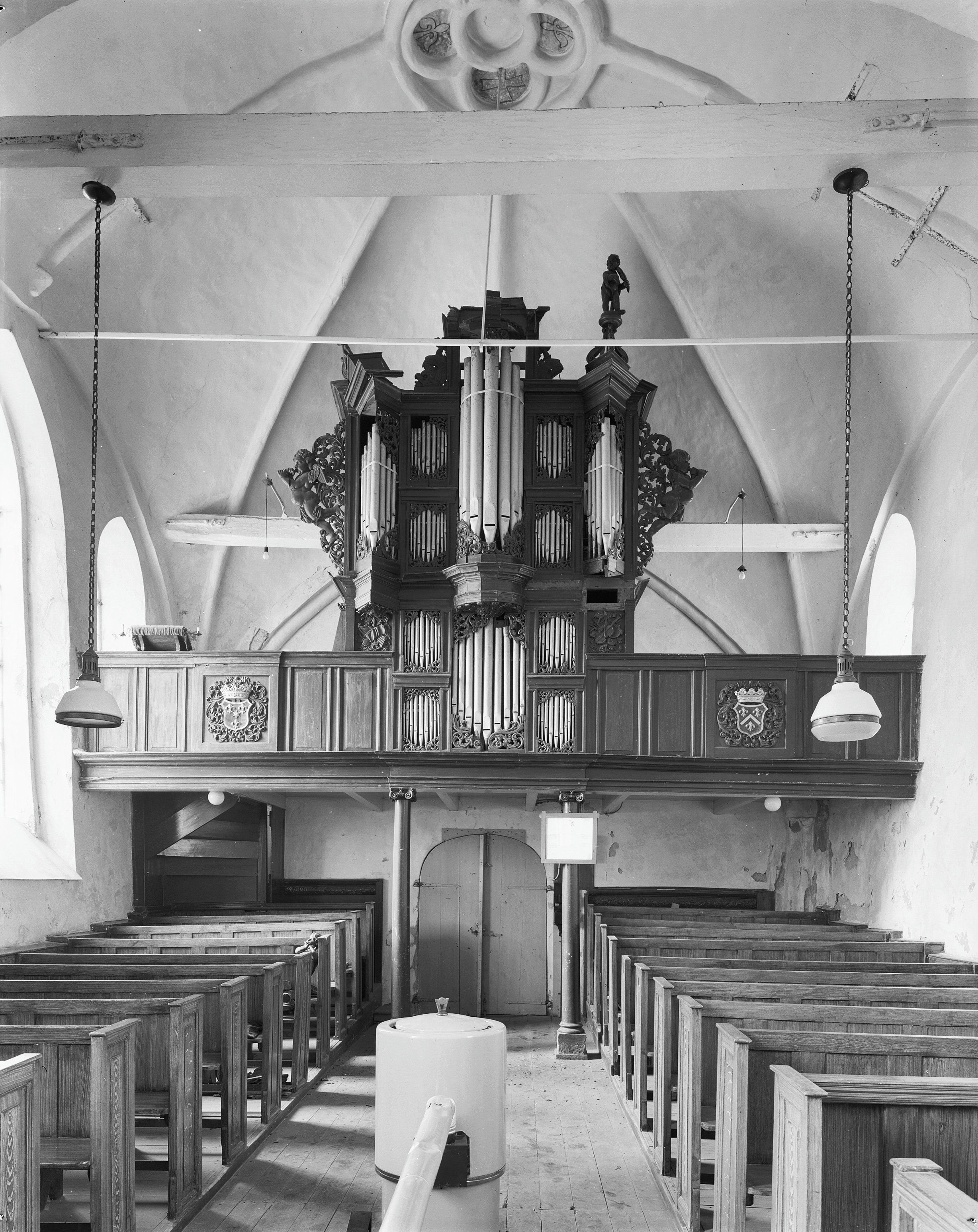 N.H.Kerk en Toren: orgel